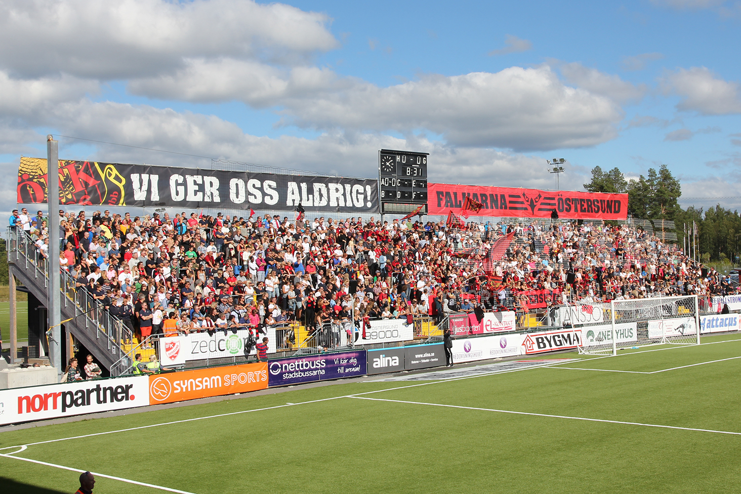 Norra ståplatsläktaren